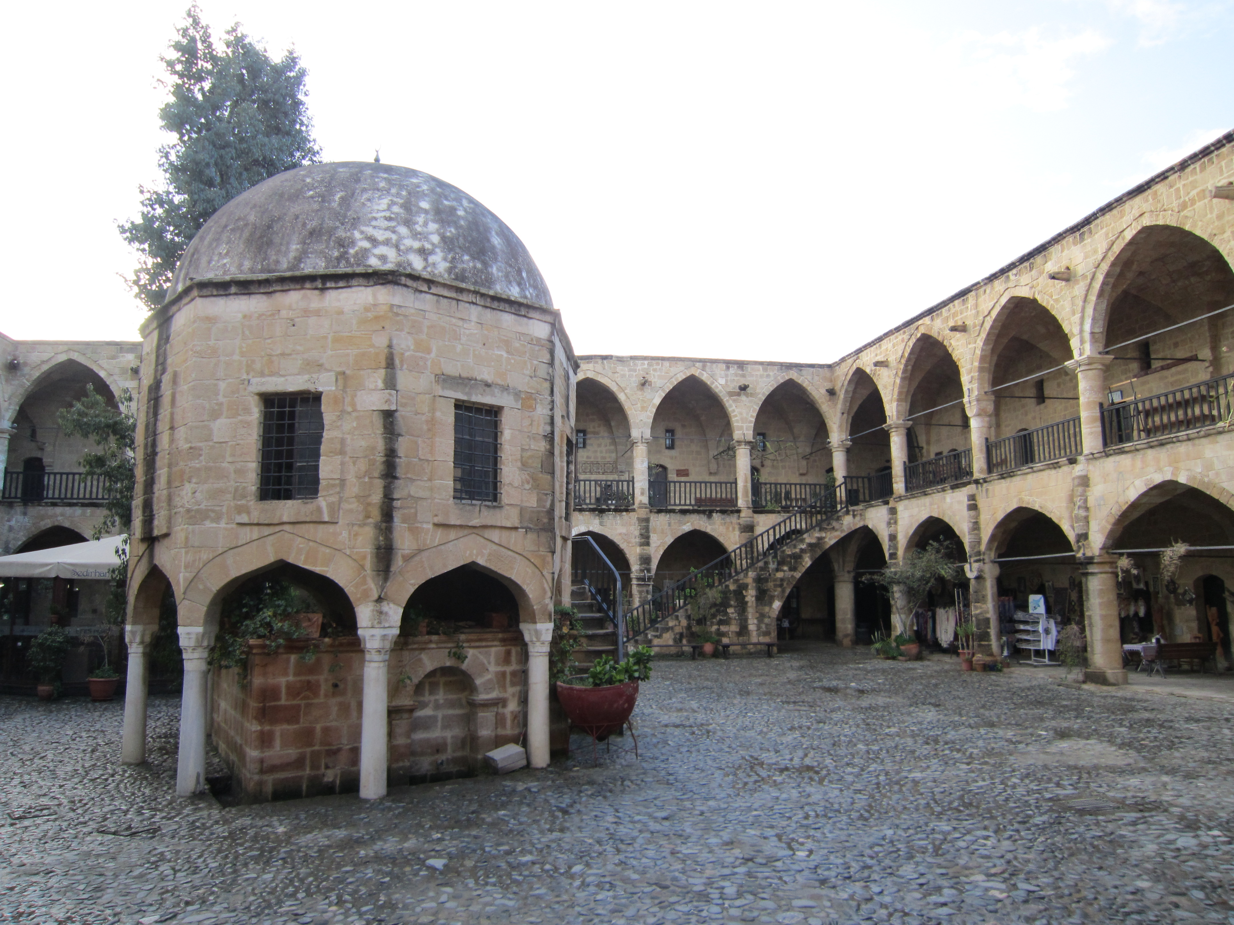 Büyük Han 5